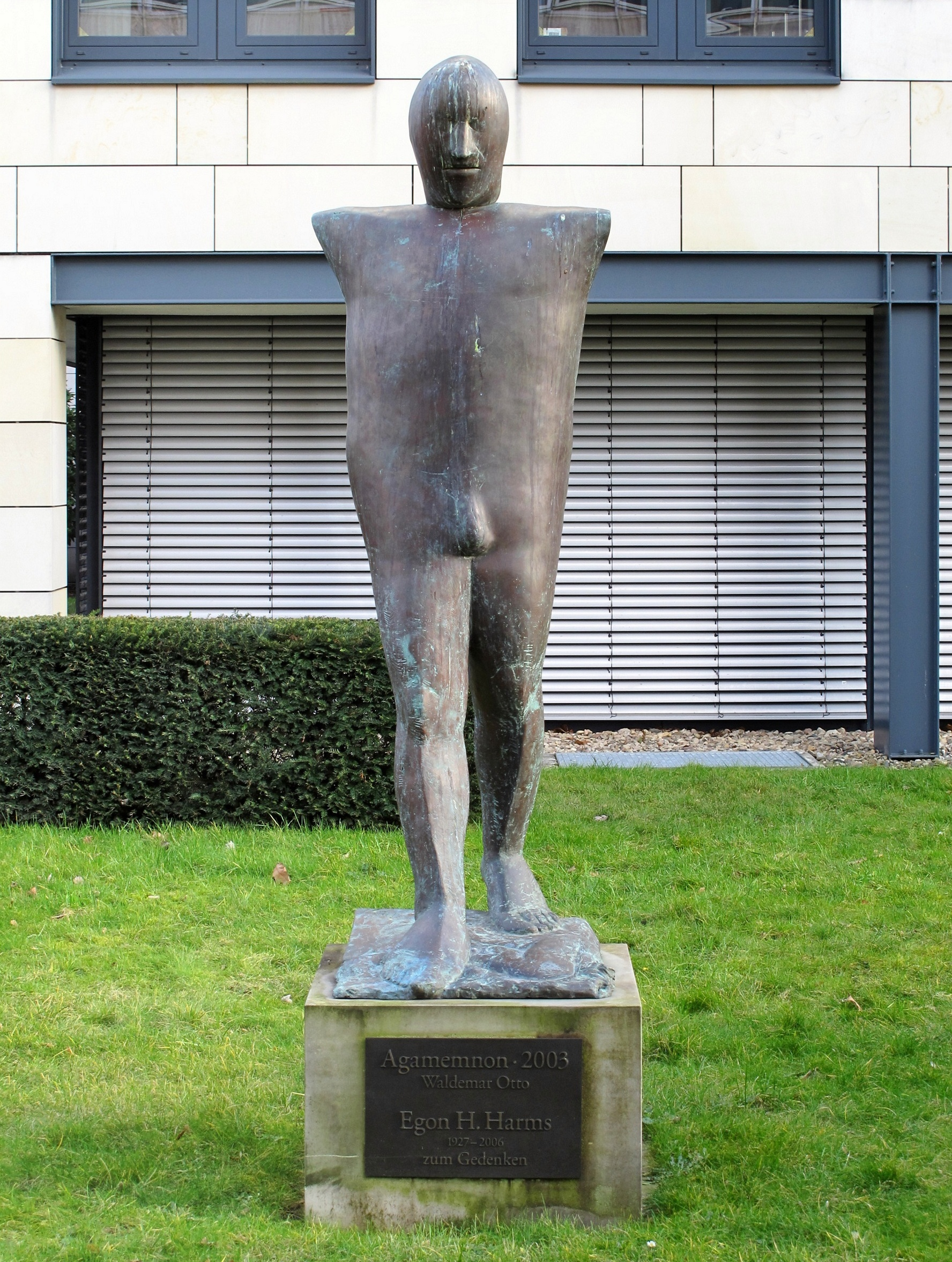 Skulptur: Agamemnon (2003), Frontalansicht. Bronze auf Betonpodest. Künstler: Waldemar Otto. Höhe: ca. 2,5 m (einschl. Podest). Aufstellungsort: Bremen-Mitte im Innenhof des Hauptverwaltungssitzes der BLG (Präsident-Kennedy-Platz 1). Aufgestellt 2009 zu Ehren des Bremer Unternehmers Egon H. Harms. k: kunst im öffentlichen raum bremen